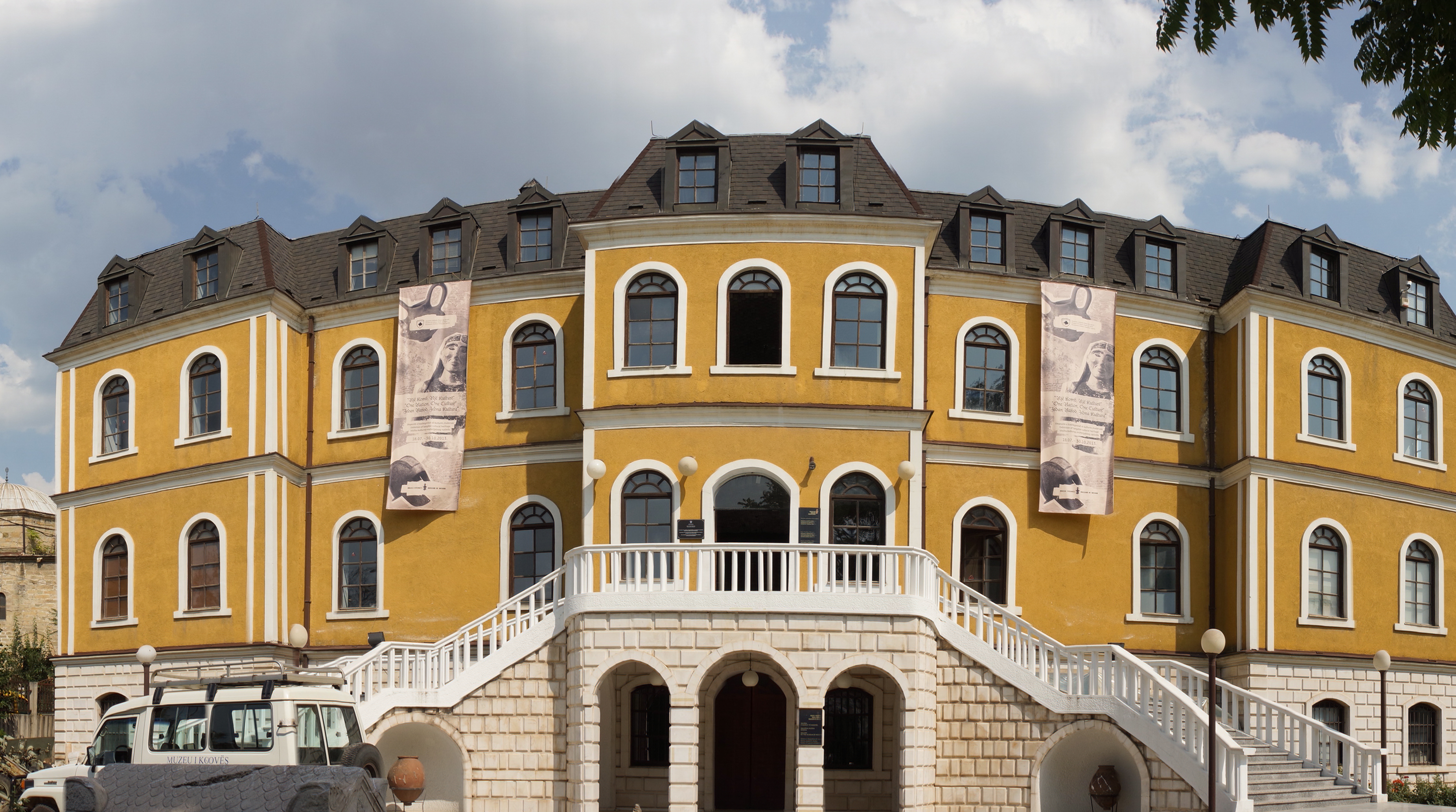 Musée national du Kosovo, Priština.